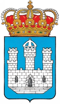 escudo de la localidad de Castellote (Teruel)